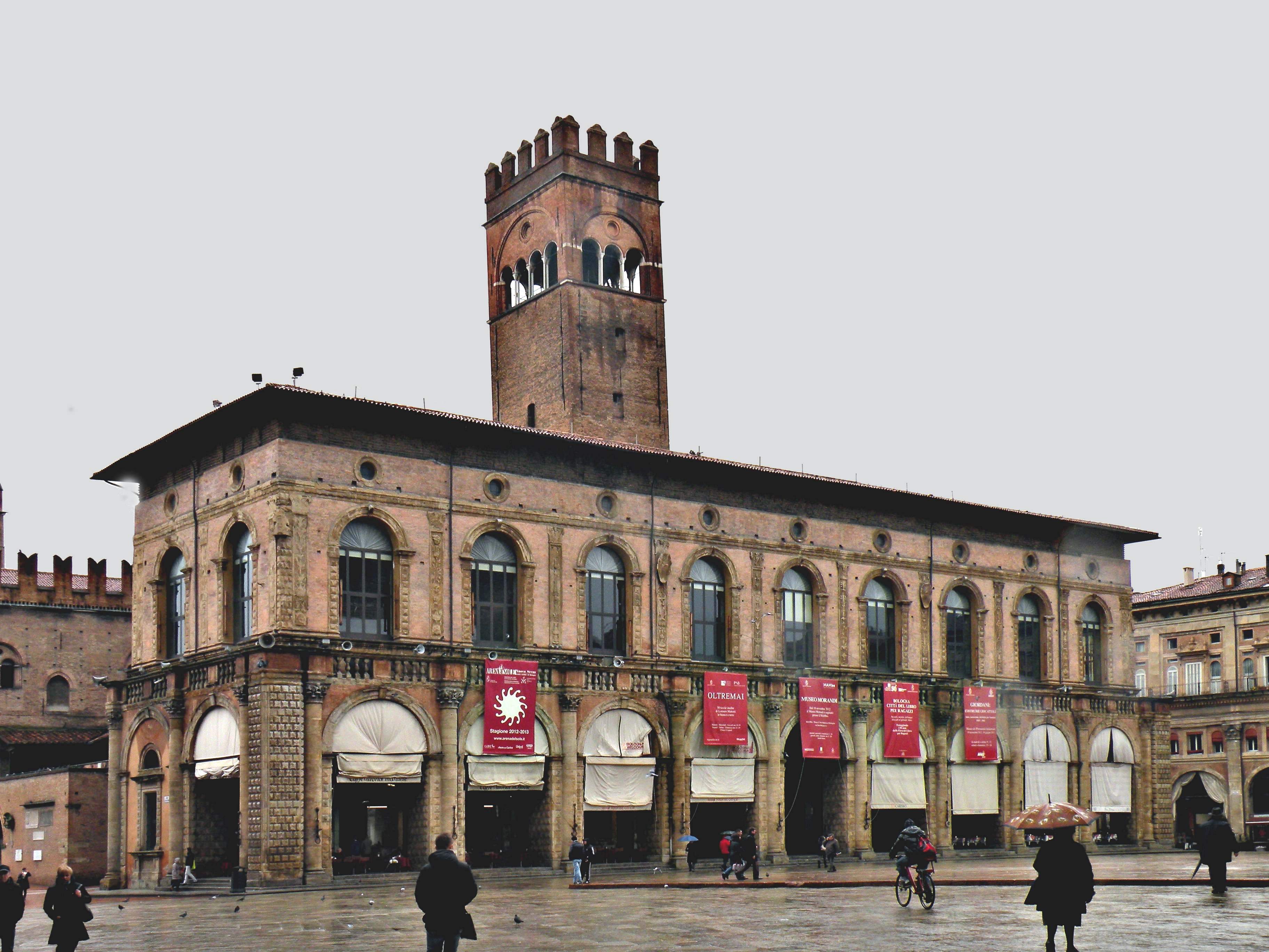 Palazzo del Podesta в Болонье